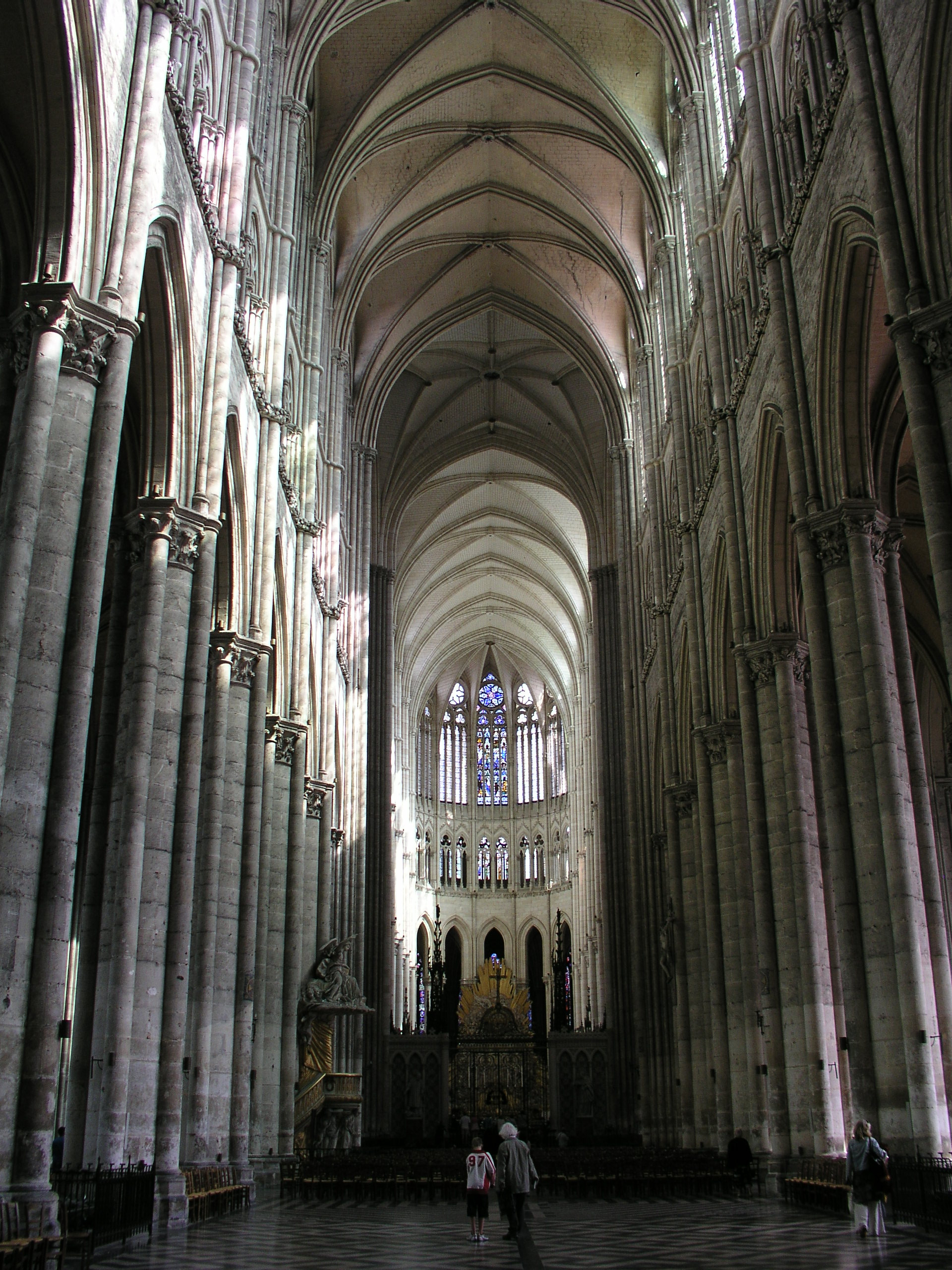 Mittelschiff Amiens